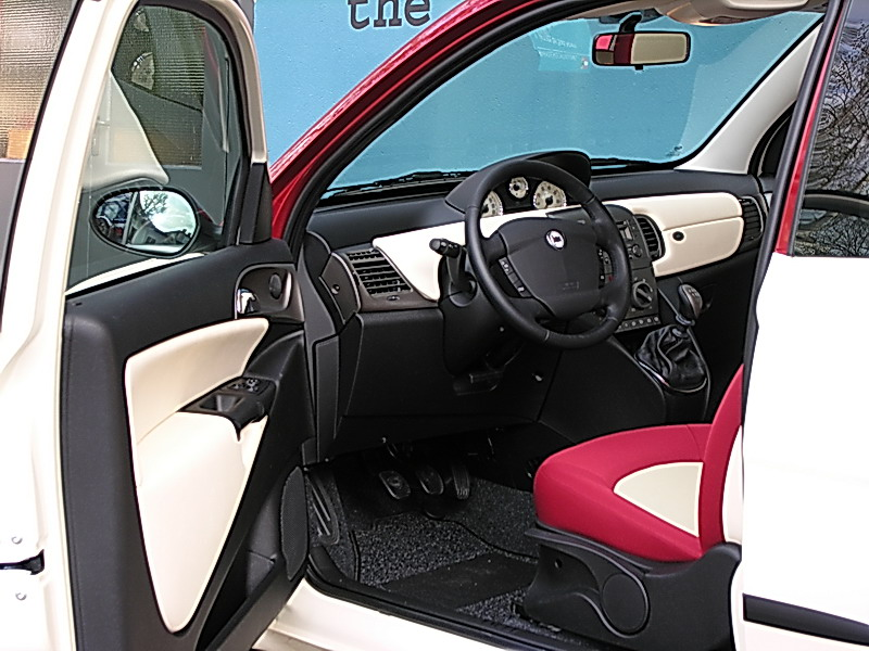 Lancia Y Bicolore Innenausstattung